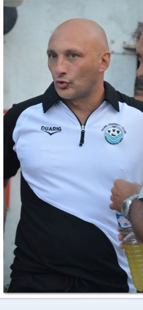 Pantaloni lors d'un match amical du Tours FC contre Châteauroux (juillet 2013)